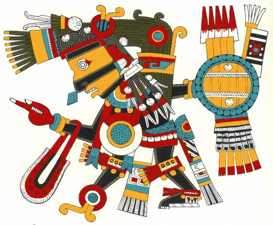 Tezcatlipoca negro, Códice Borxia.